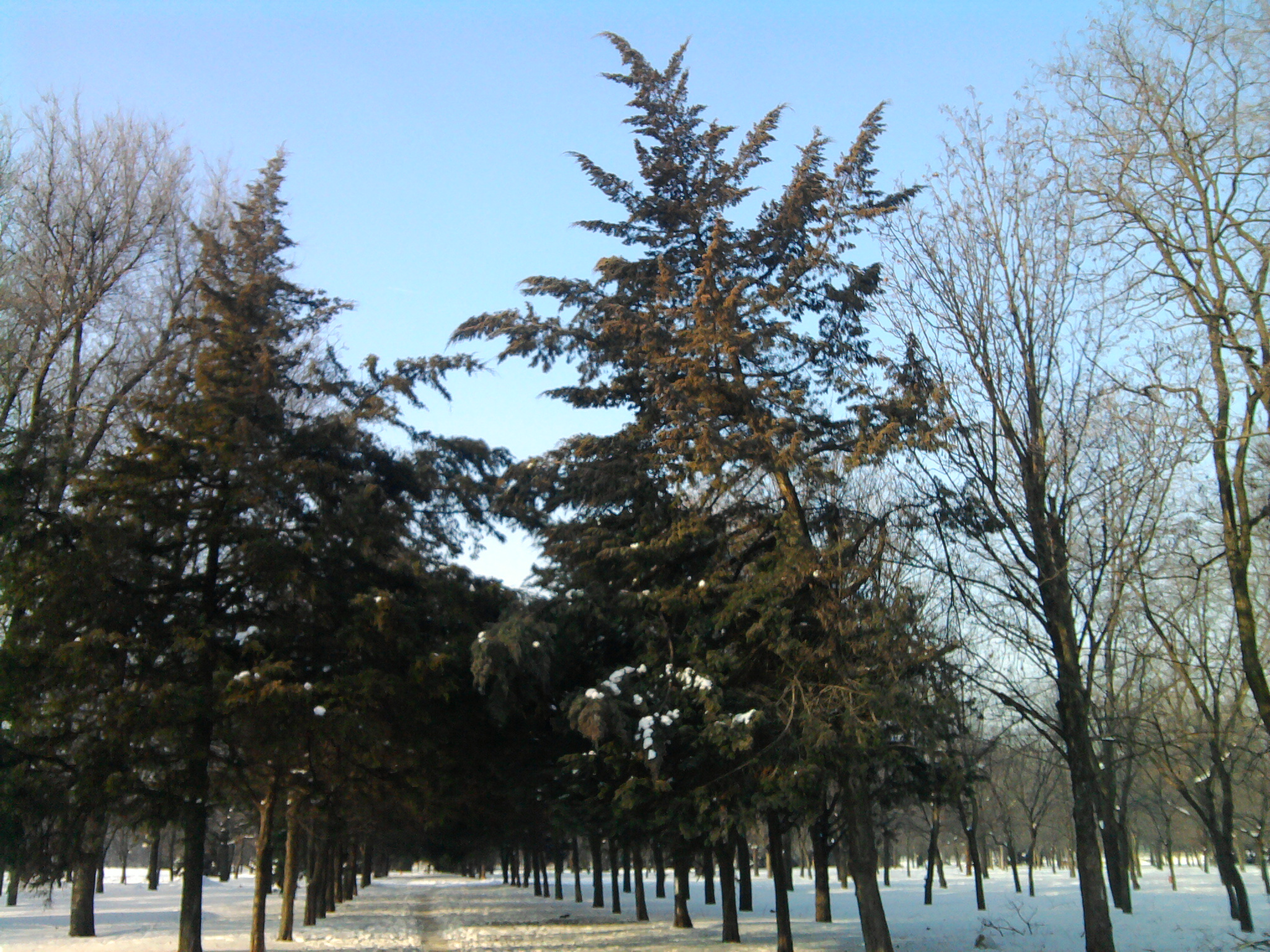 Аллея